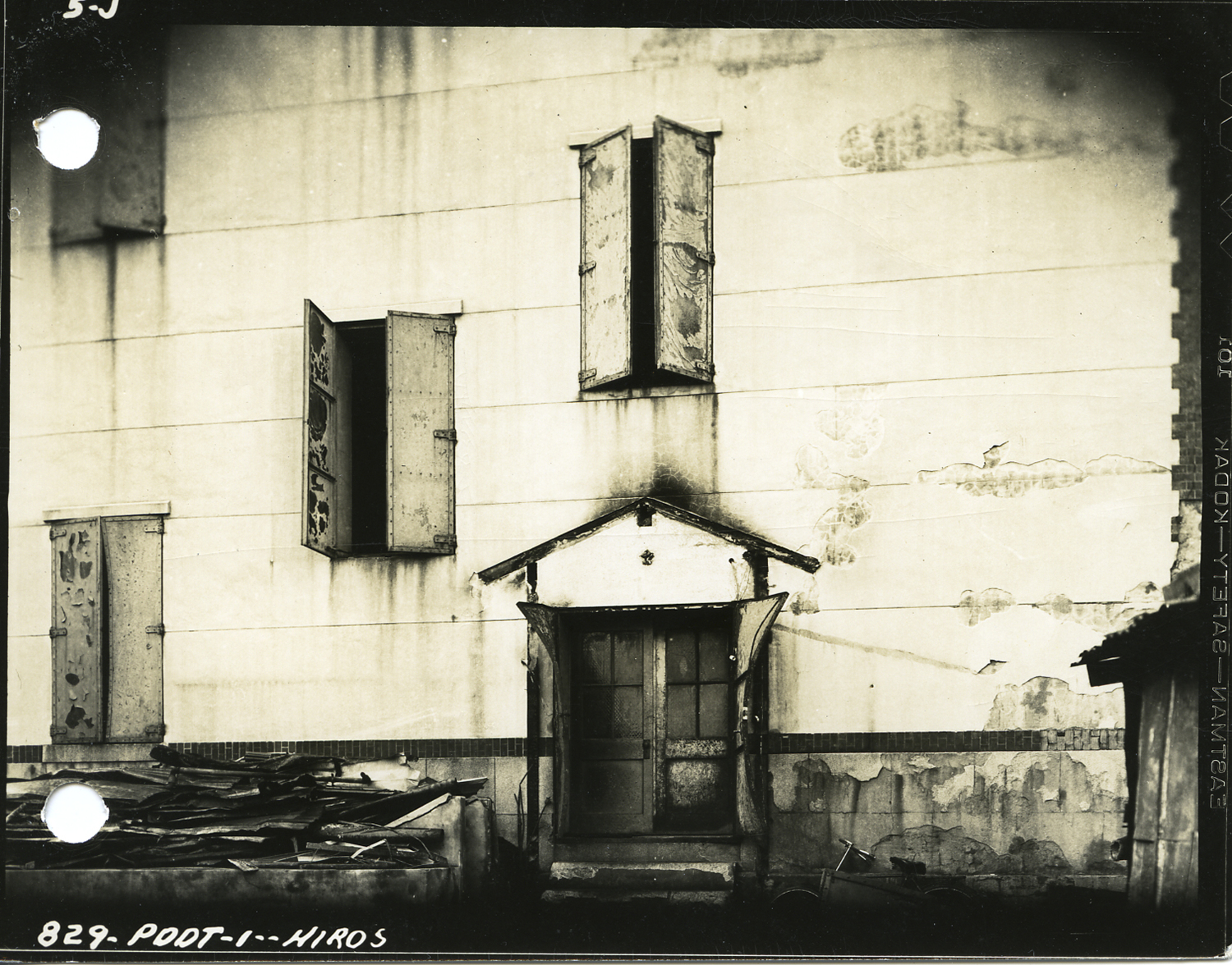 被爆した住友銀行東松原支店の鉄窓